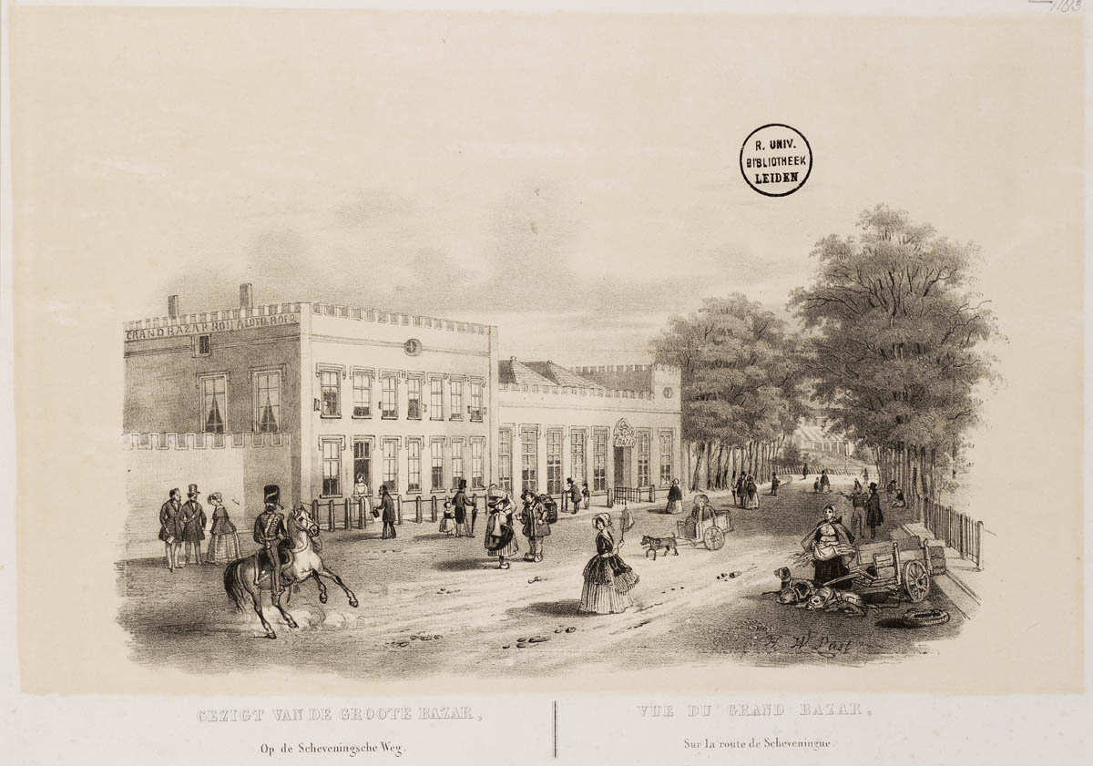 "Gezigt van de Groote Bazar op de Scheveningsche Weg. / vue du Grand Bazar sur la Route de Scheveningue." Blik op het neo-gotische gebouw van de Grote Bazar aan de Zeestraat.